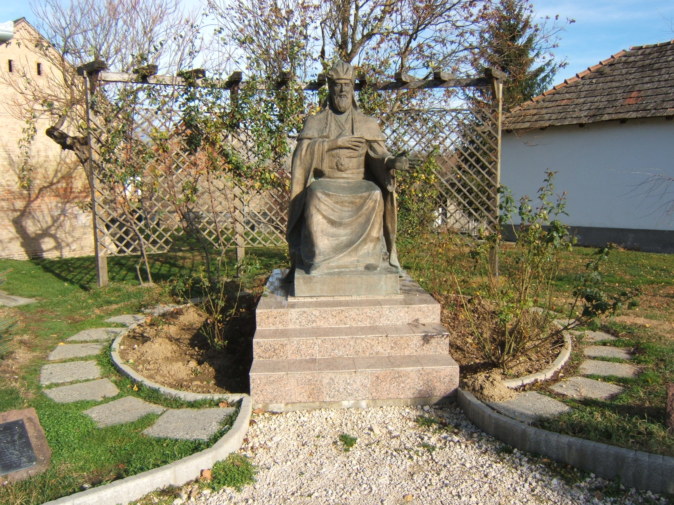 Gül Baba szobra Törökkoppányban